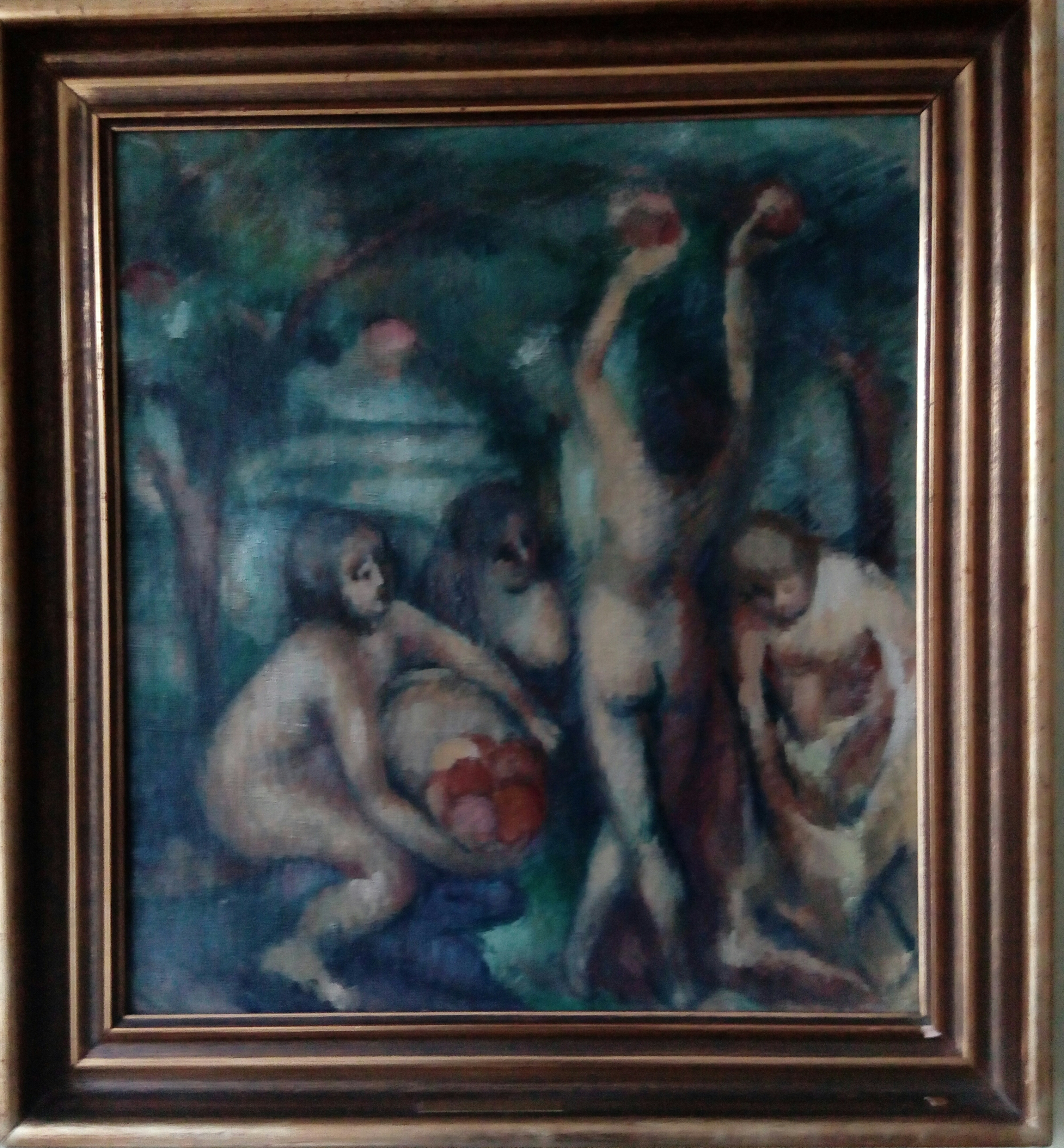 Obraz malíře Alfreda Justitze